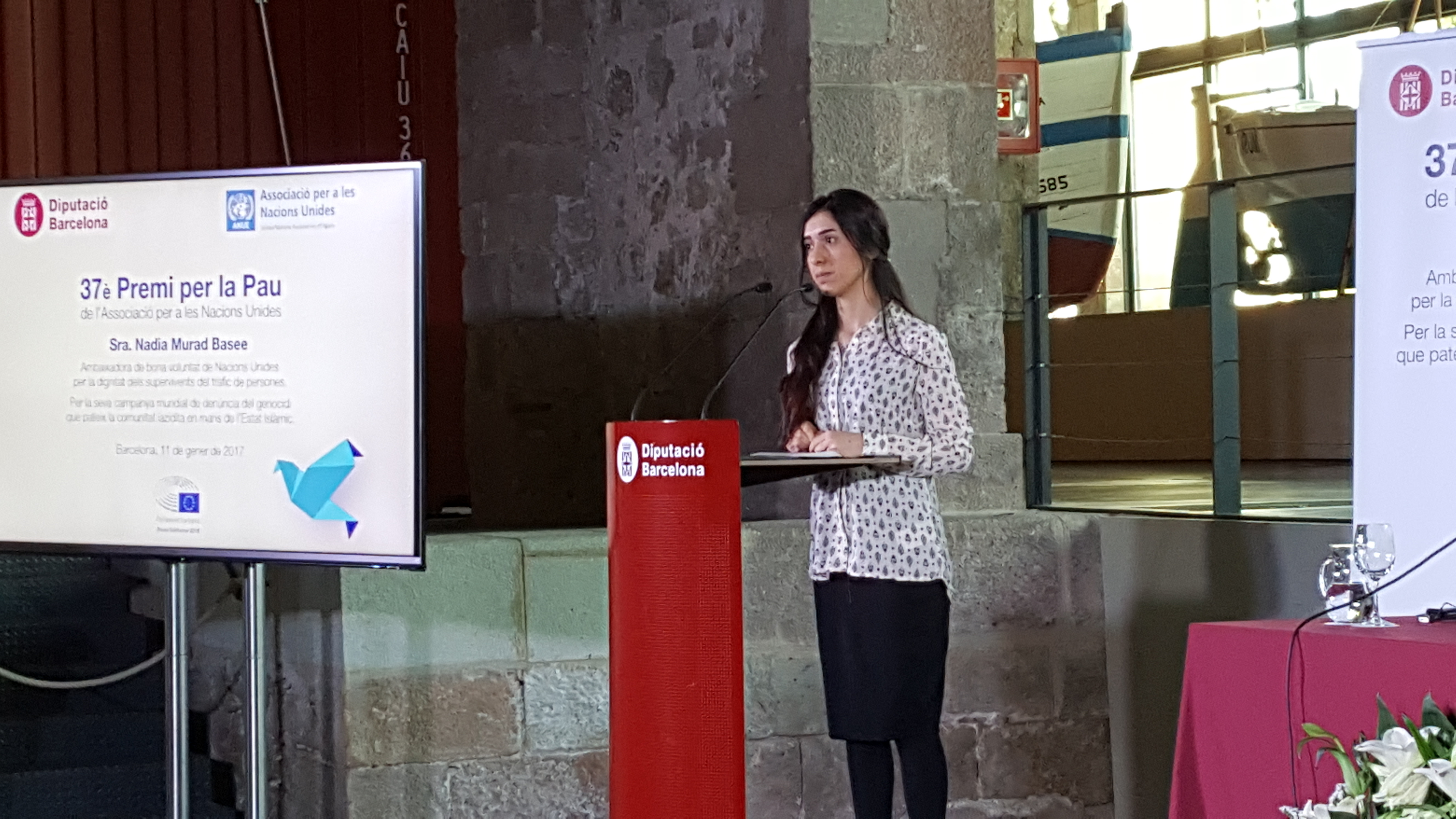 Nadia Murad reb el premi per la pau a Barcelona